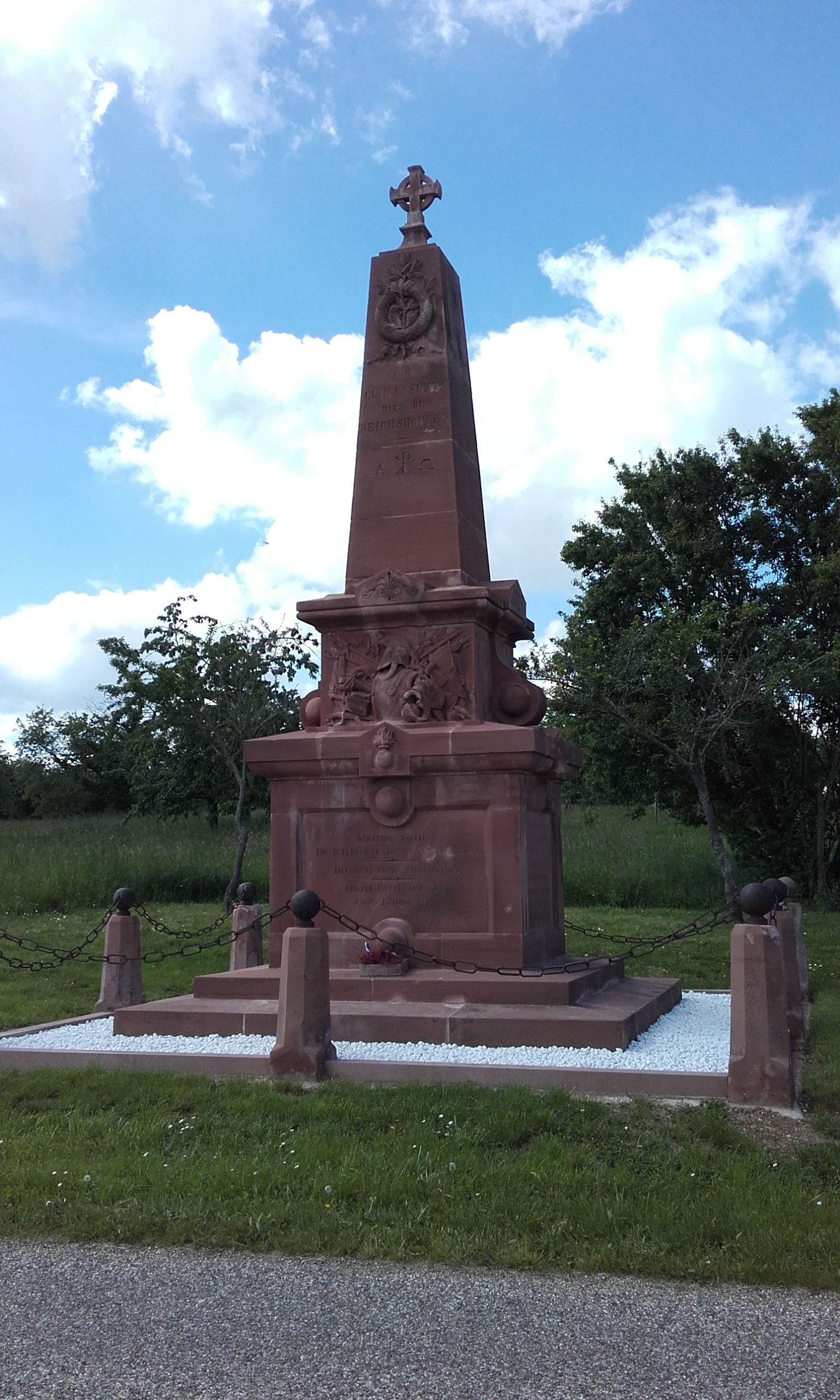 Bas-Rhin, Mosbronn-les-Bains. Monument des cuirassiers.